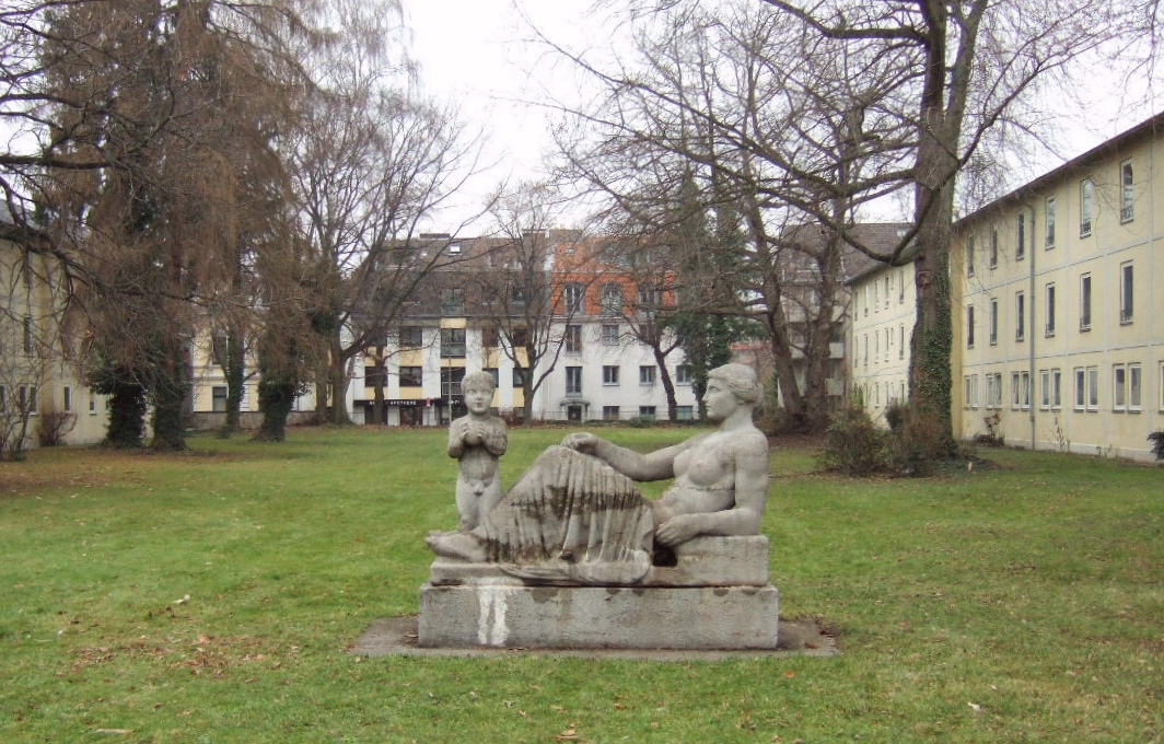 Willy Meller: Liegende mit Kind (1950) Material: Beton Standort: Bonn - Park Am Römerkastell